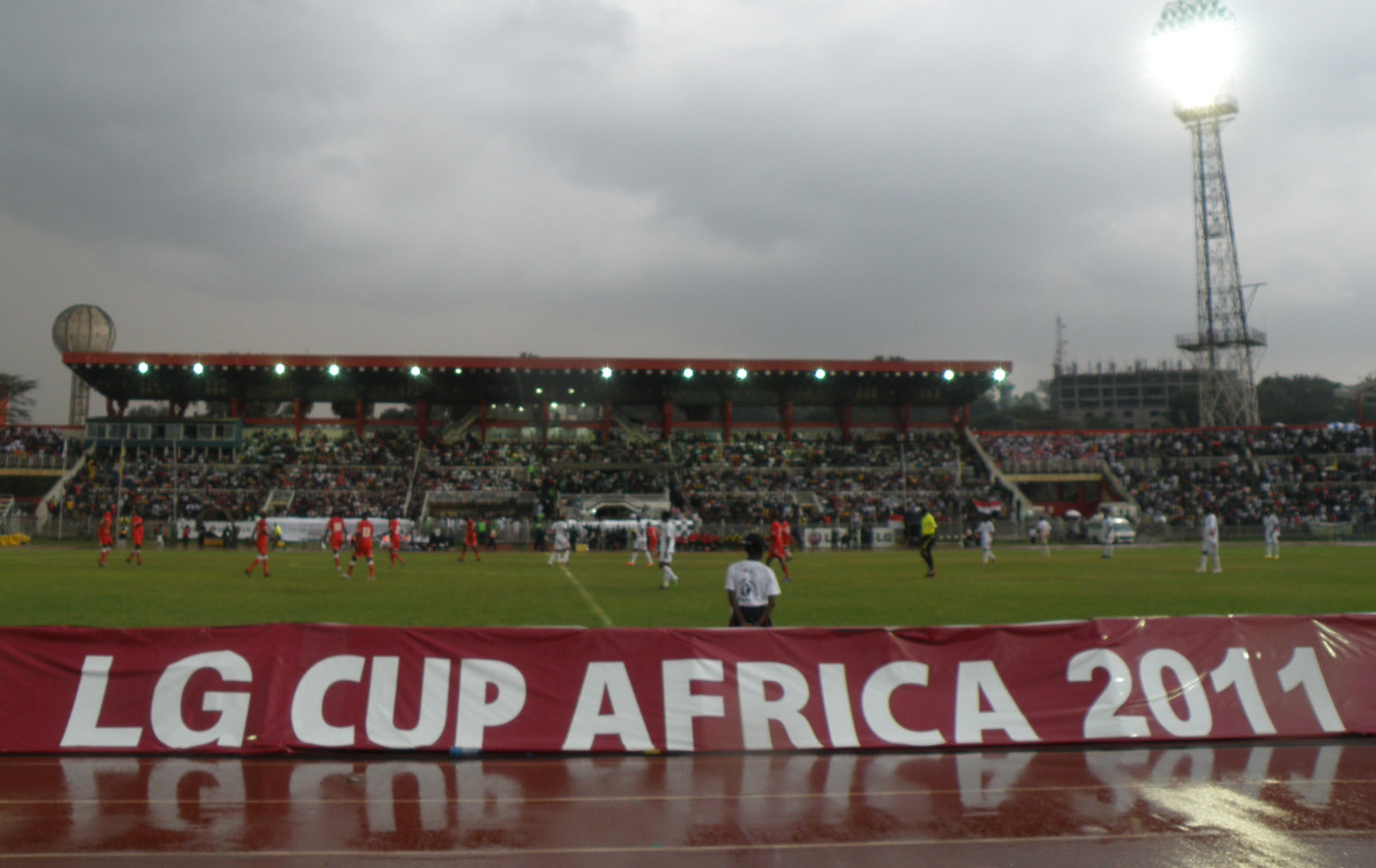 LG전자가 동아프리카에서 케냐와 수단간 국가대표 축구 친선경기 개최하고 고아원생들을 초청하는 등 사회공헌활동을 펼쳤다. LG전자가 25일(현지시각) 케냐 나이로비에서 개최한 케냐와 수단 축구 국가대표팀간의 'LG 컵 아프리카 2011' 친선 경기 모습 ※ LG전자 뉴스룸 에서 관련 보도자료를 확인실 수 있습니다.